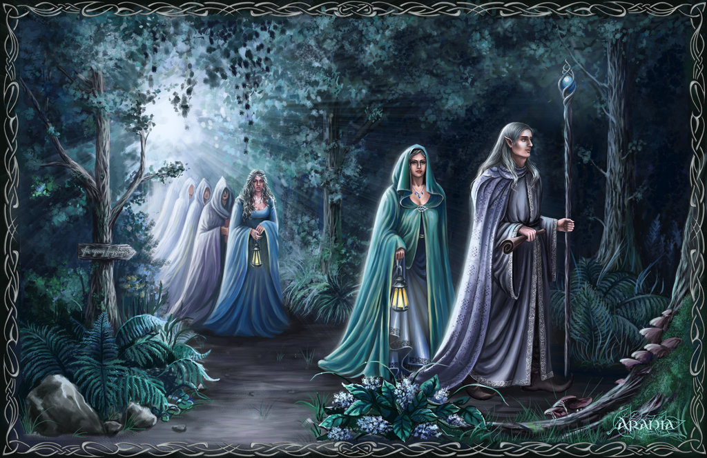 Vue d'artiste des Elfes quittant la Terre du Milieu